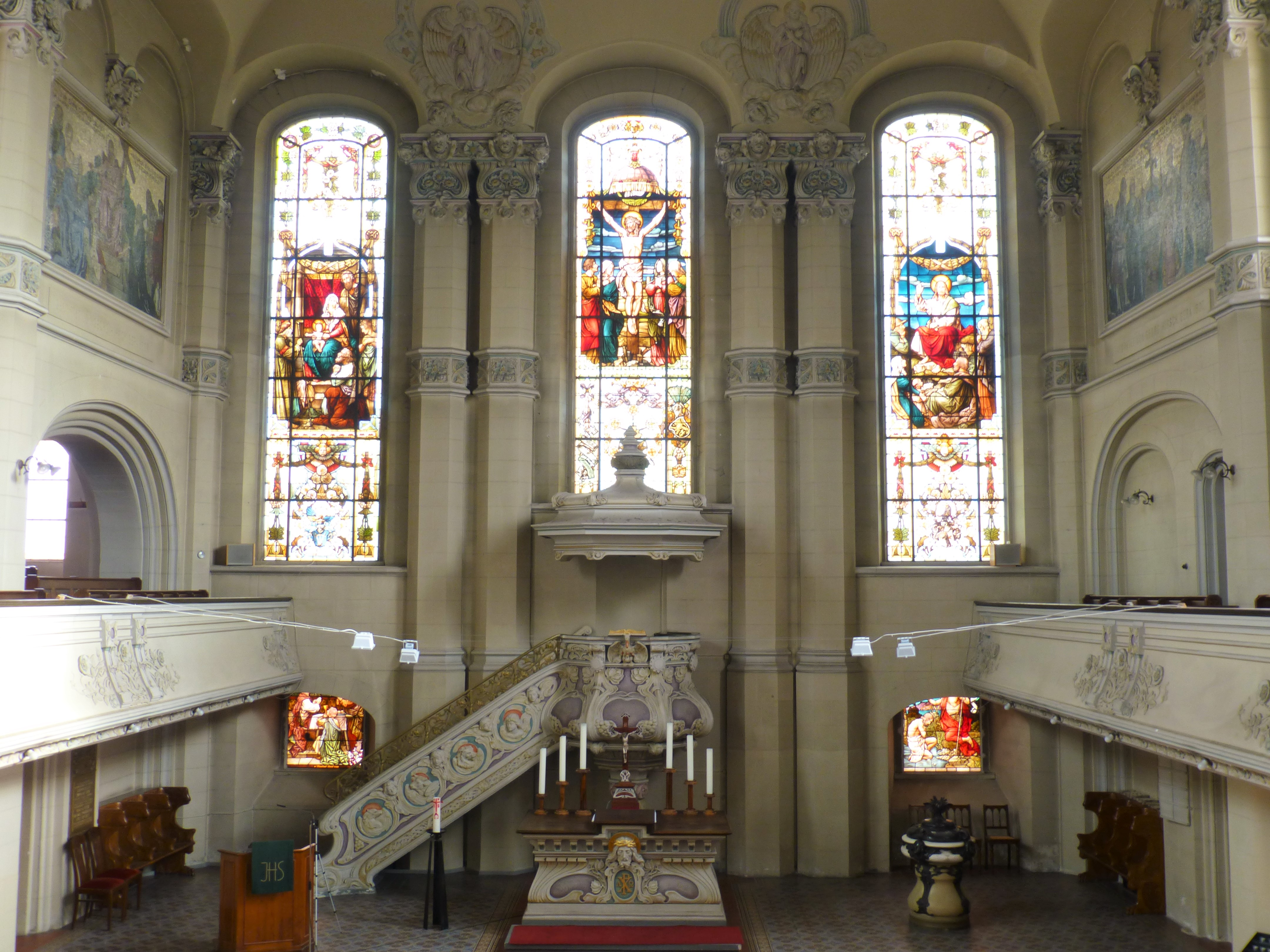 Salvatorkirche Gera, Innenausstattung im Jugendstil, Blick von der Empore zum Altar und zur Kanzel